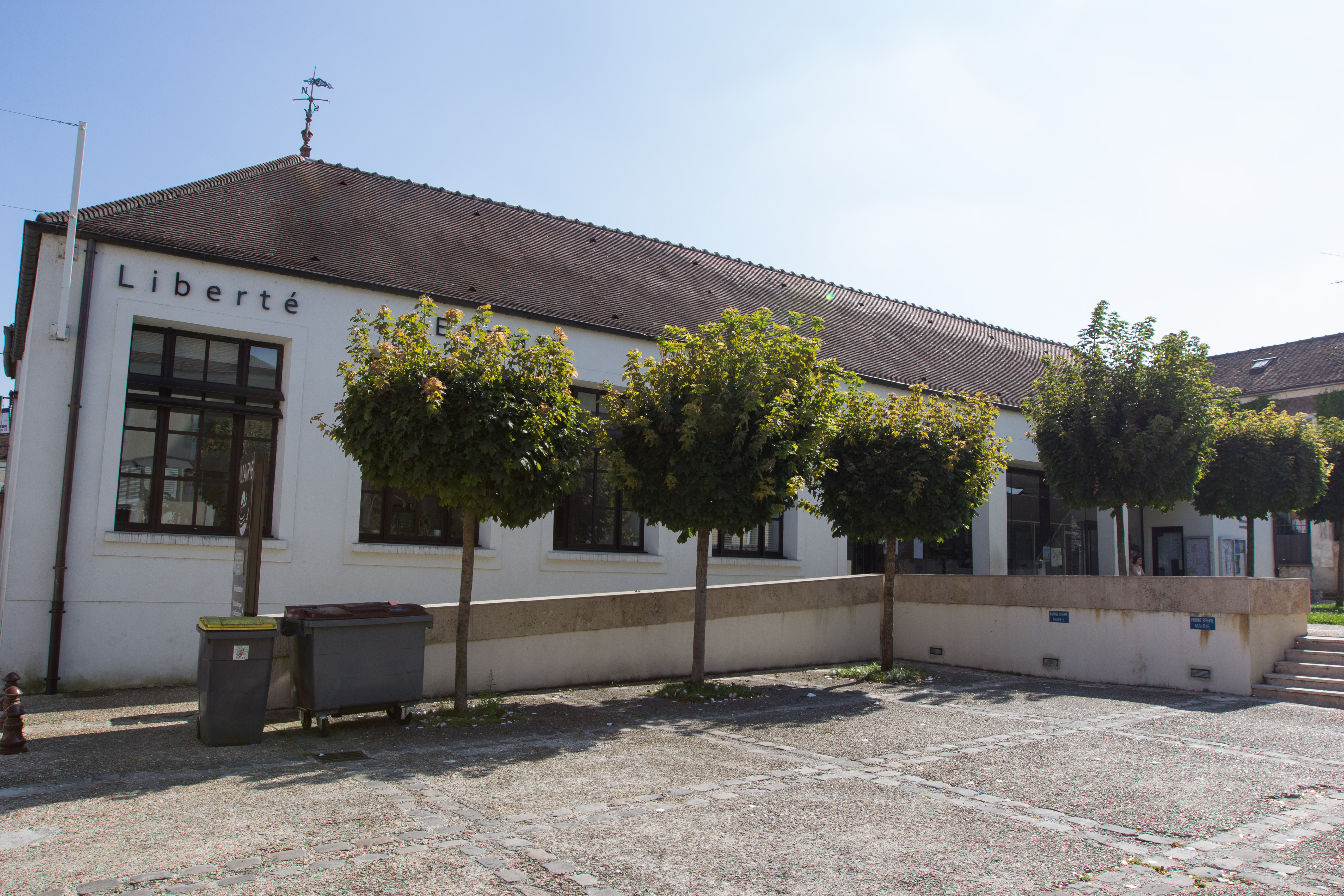 Hôtel-de-ville de Saint-Mammès (Seine-et-Marne, France)